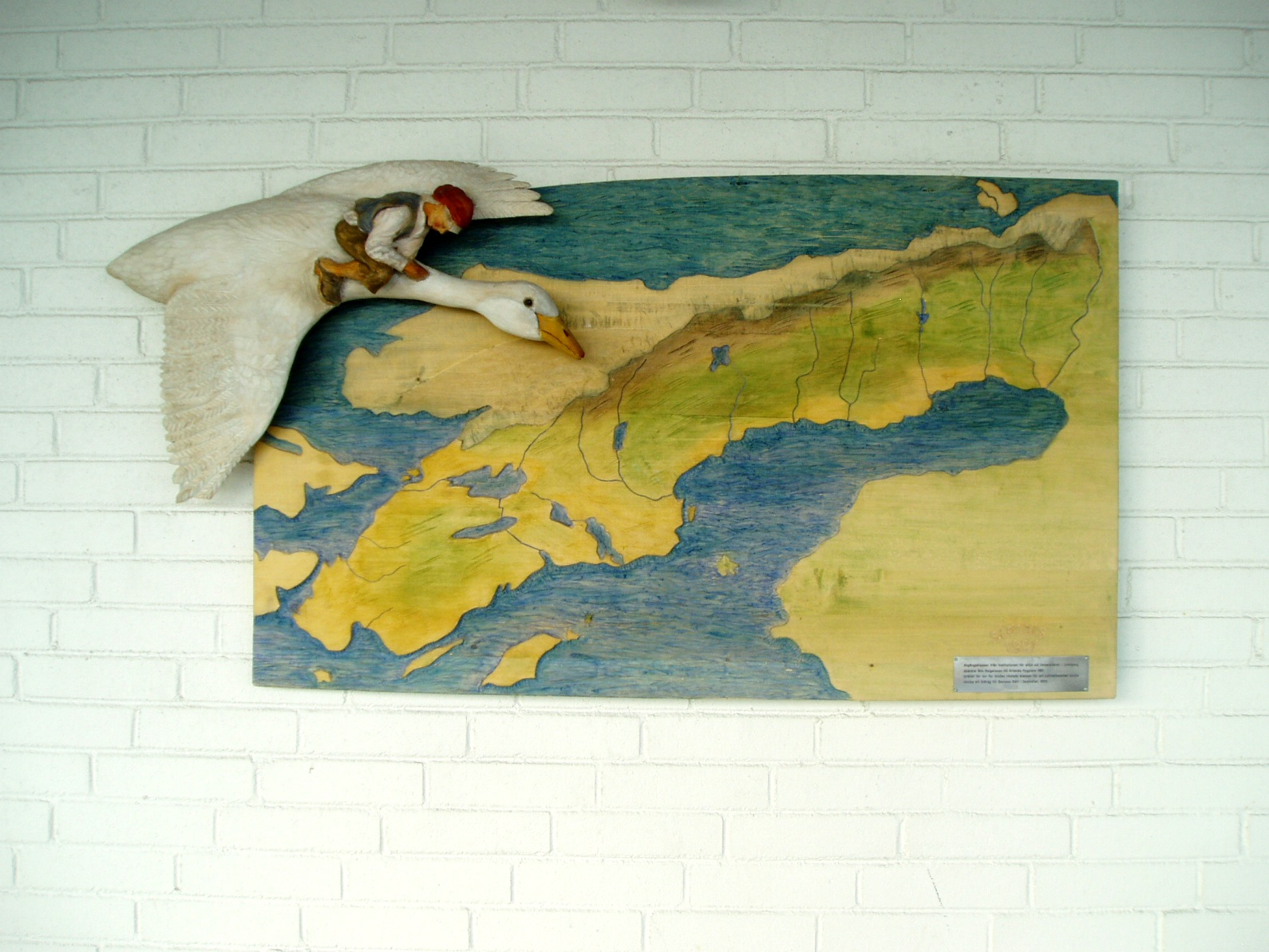 Relief in wood, showing "Nils Holgersson", relief made by Avgångsklassen 1991, institutionen för slöjd, Linköping Location: Arlanda airport